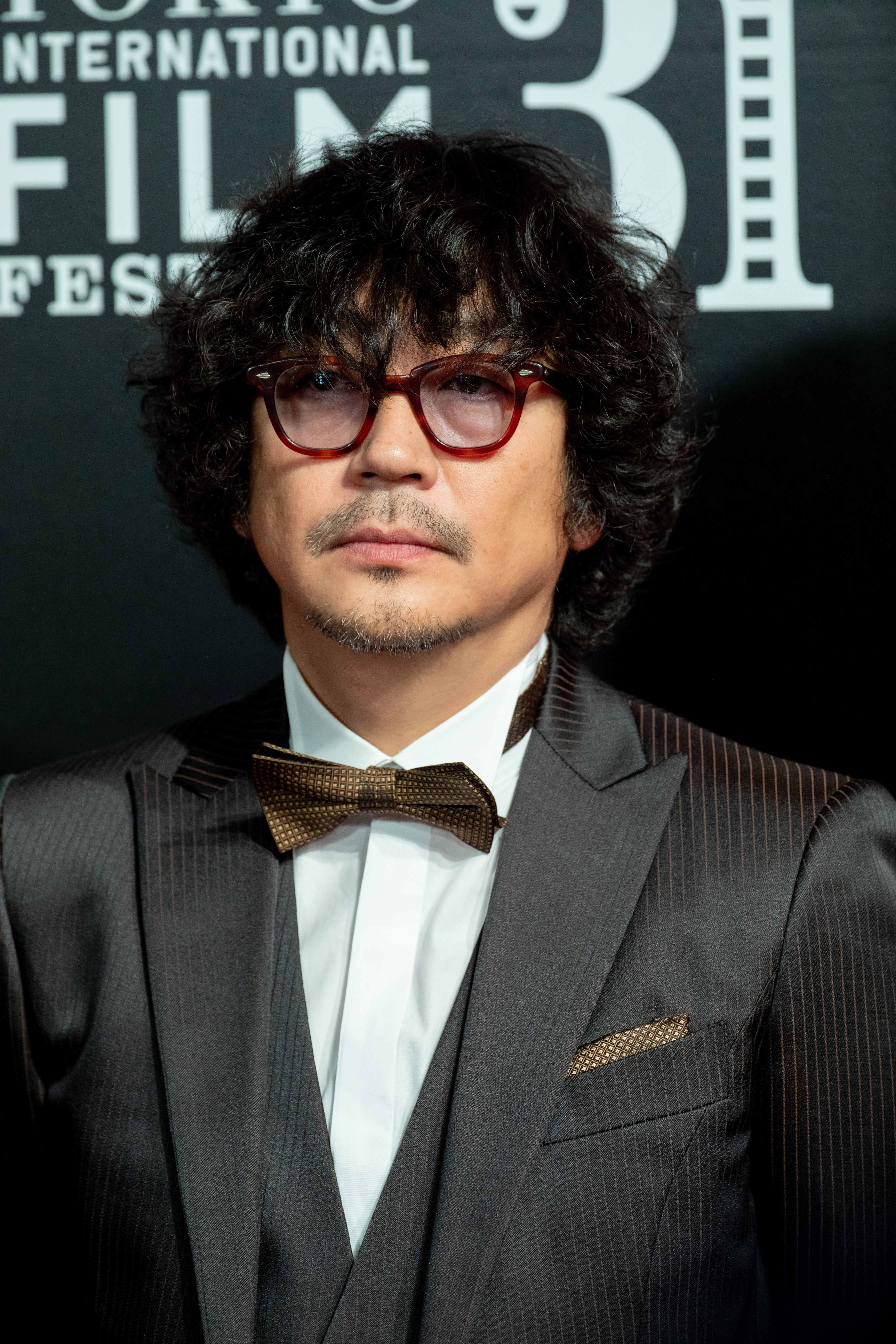 第30回 東京国際映画祭 オープニングセレモニー 大森南朋 (鈴木家の嘘)